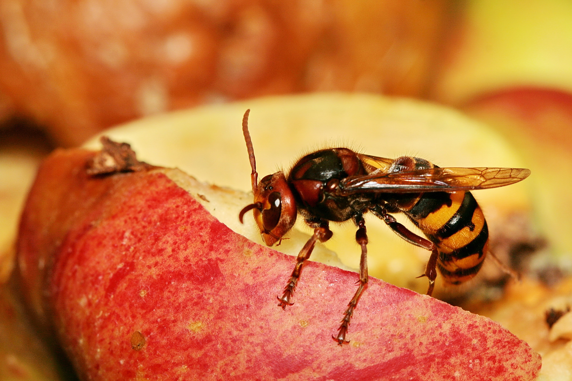 Hornisse am Apfel (25°C) in Isernhagen, Niedersachsen, Deutschland